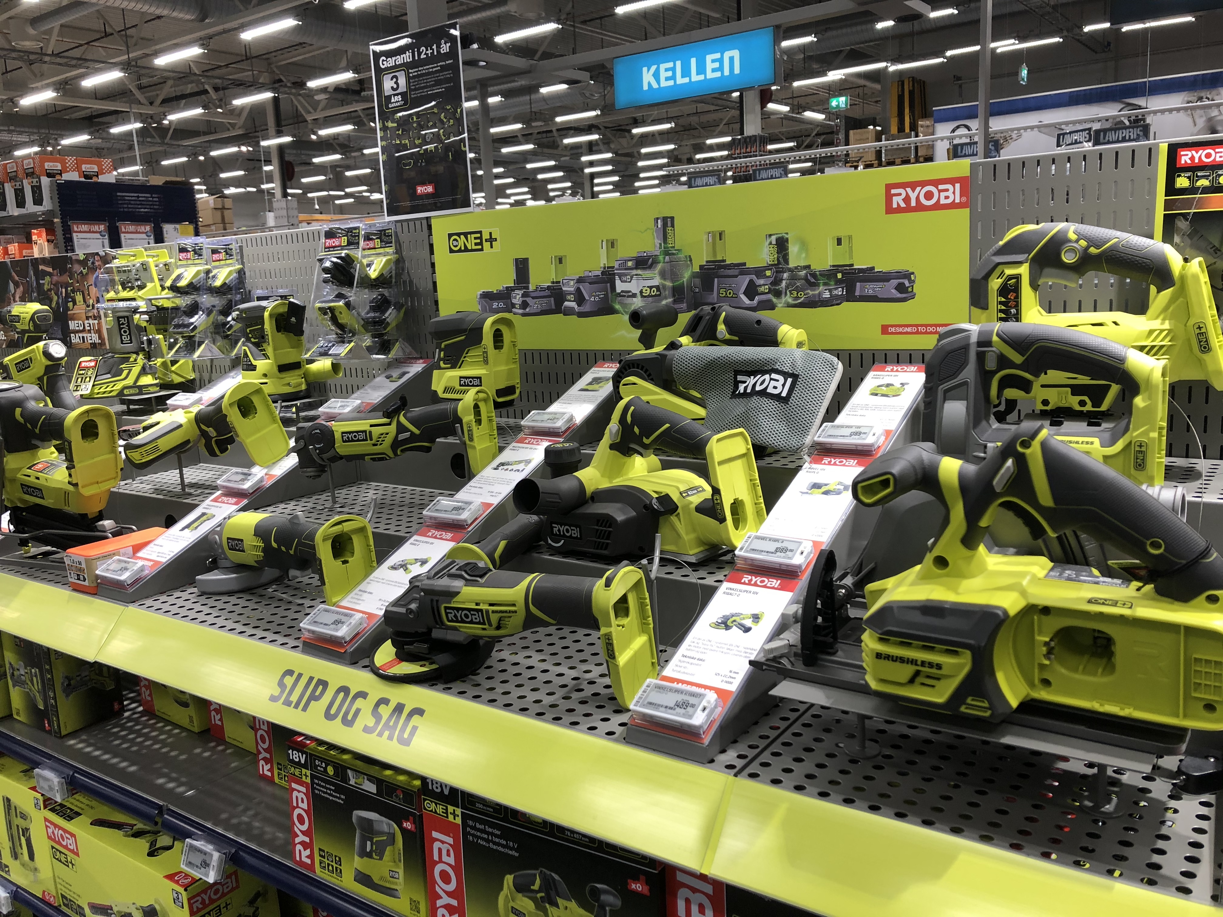 Ryobi eletriske verktøy